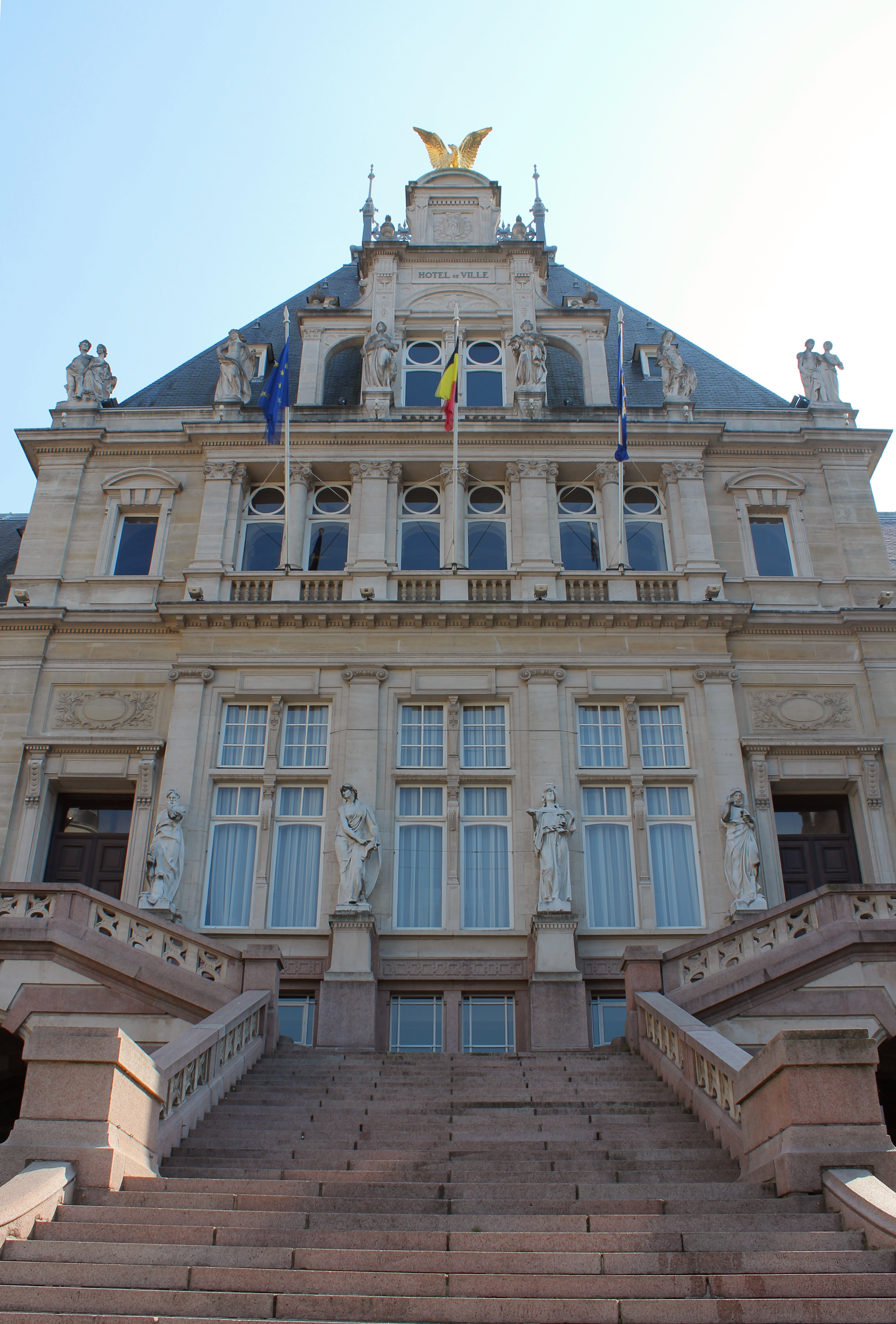 Vue en contre plongée de la partie centrale de l'Hôtel de ville de Saint-Gilles à Bruxelles, en Belgique.